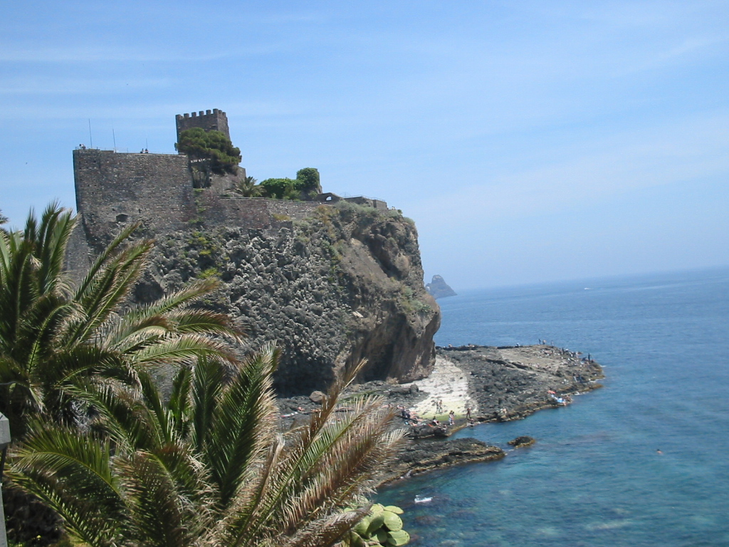 castello di acicastello